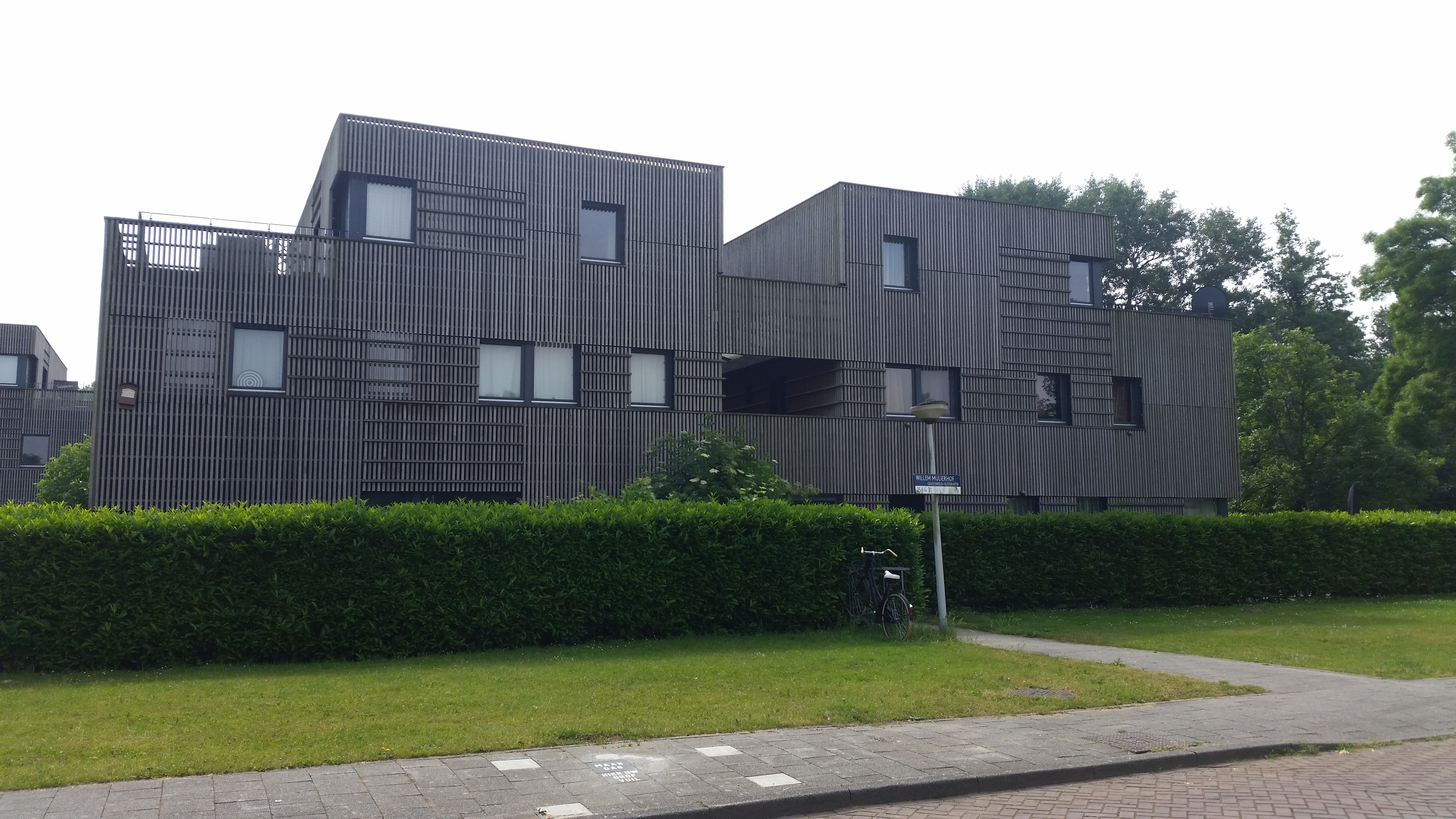 Willem Mulierhof 25-31, Amsterdam-Geuzenveld